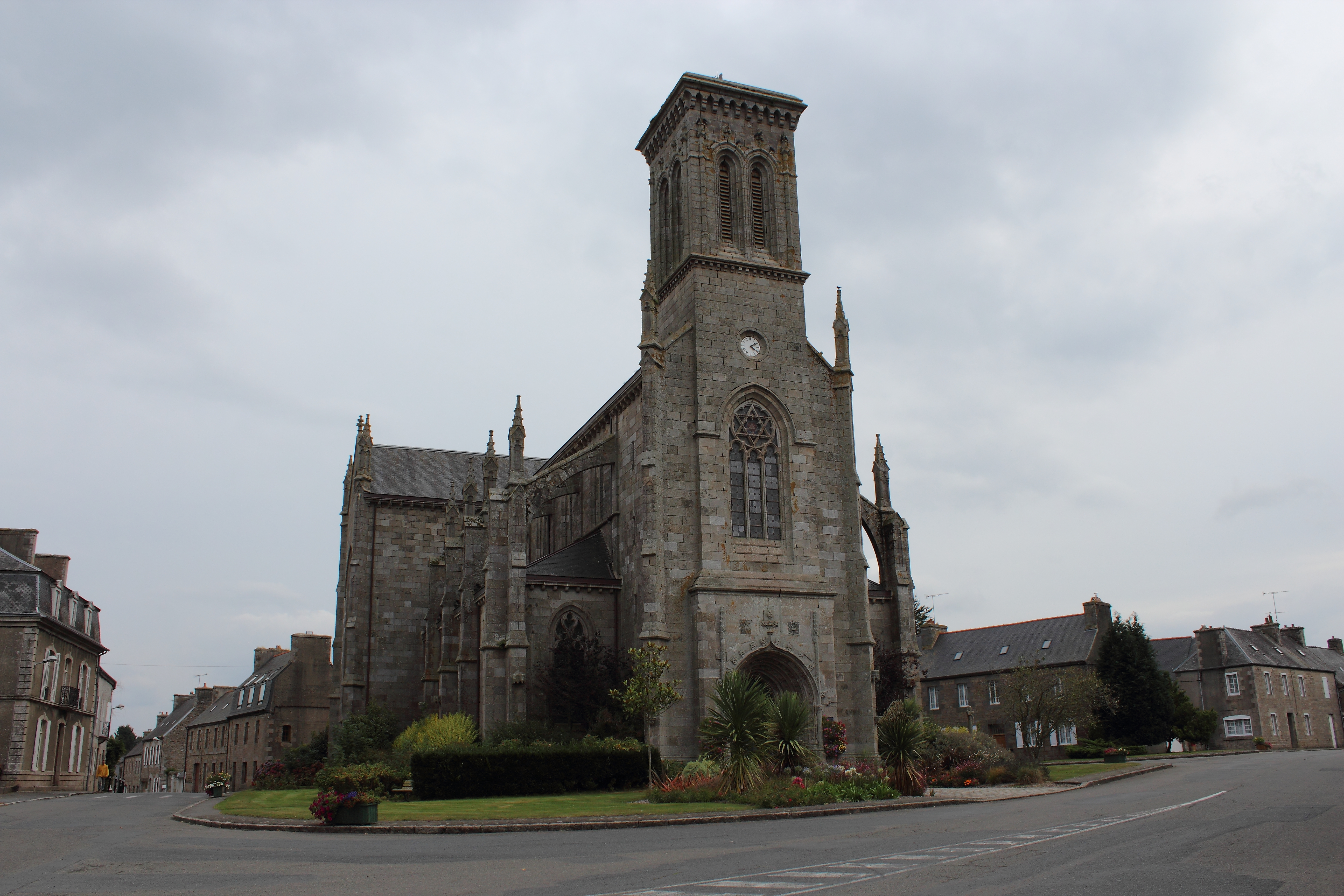 Église Notre-Dame sur la commune du Vieux-Marché en Côtes-d'Armor. .